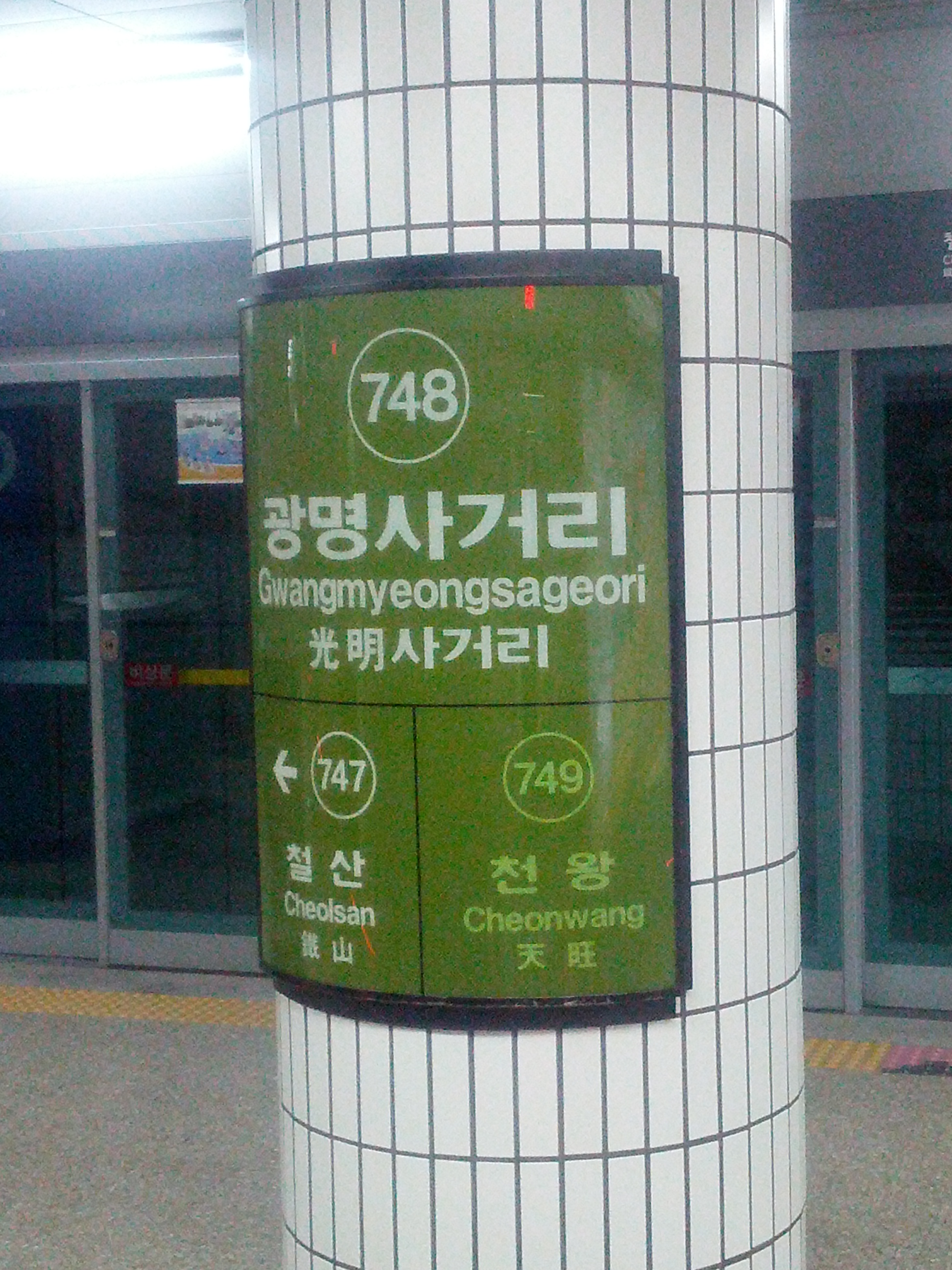 광명사거리역 역명판